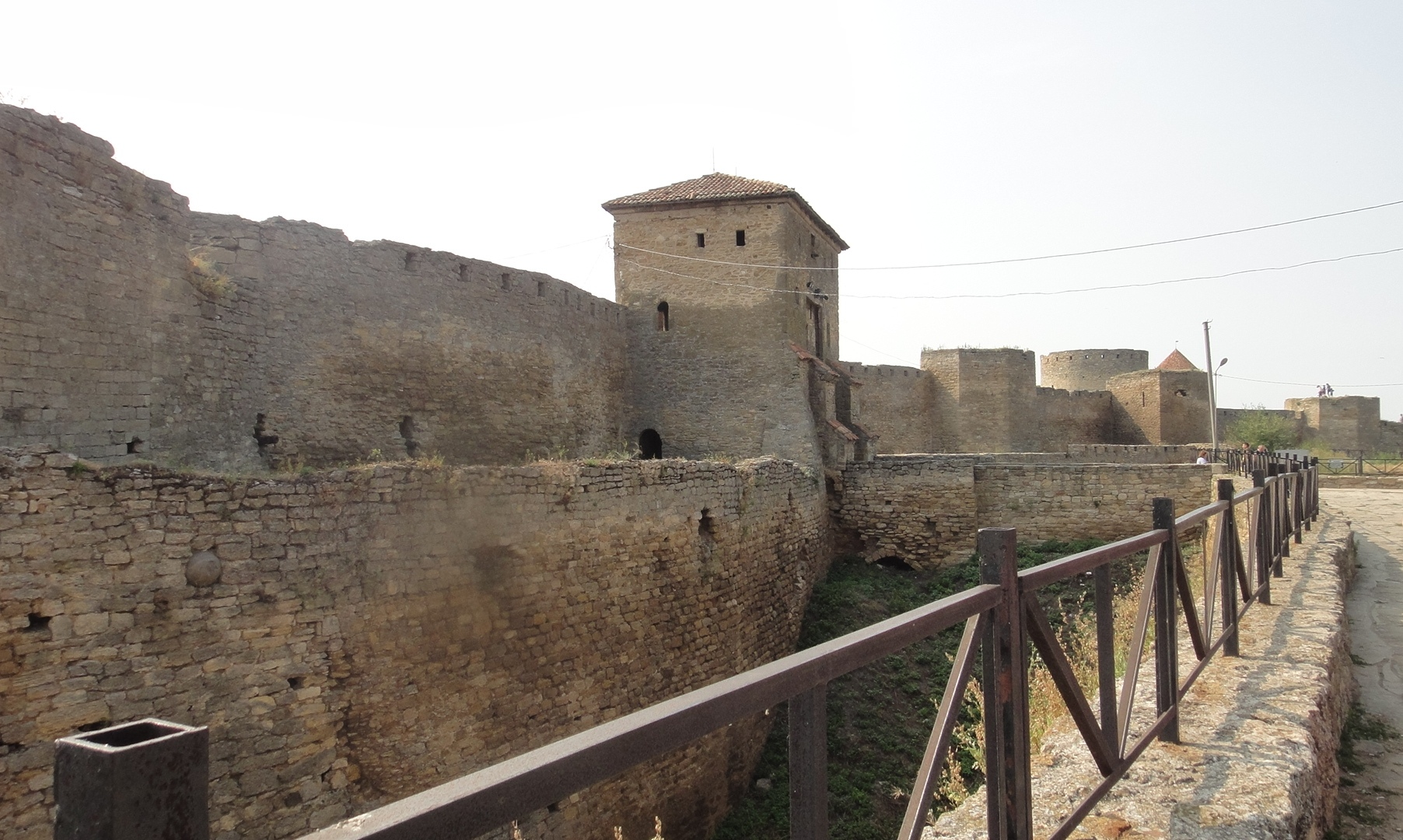 Один из видов Белгород-Днестровской крепости (Аккерманской)(Украина)